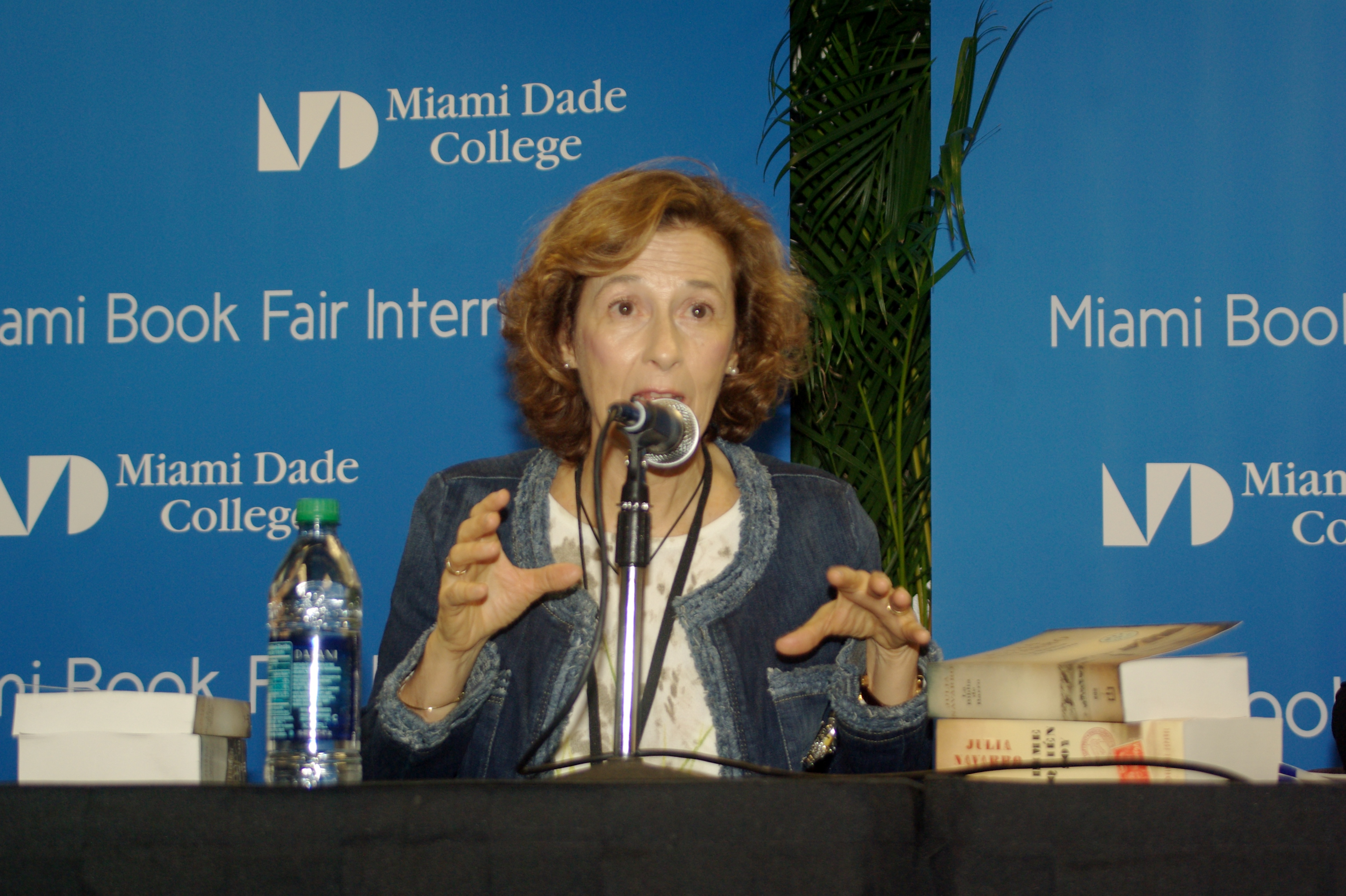 Julia Navarro en la Feria Internacional del Libro de Miami, 2014